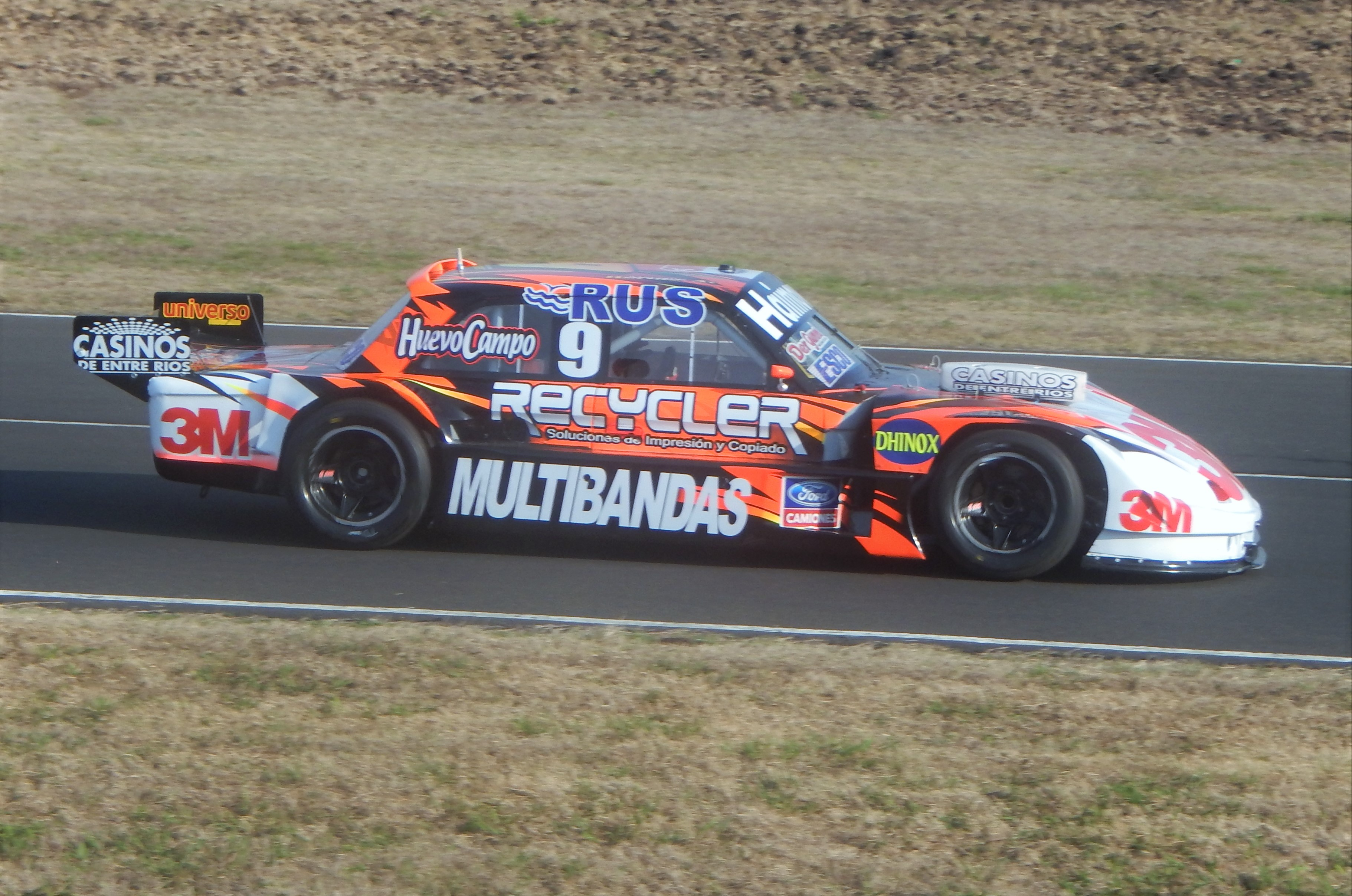 Mariano Werner Paraná 2015